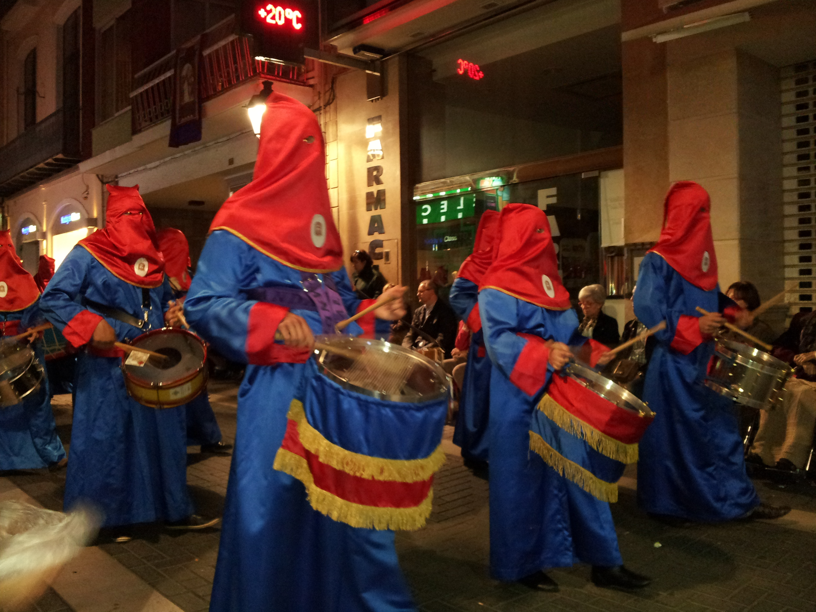 Procesión del Miércoles Santo de 2015 en Villarreal (España) This is a photography of a Folklore festival in Spain (Wikidata id Q23663127).